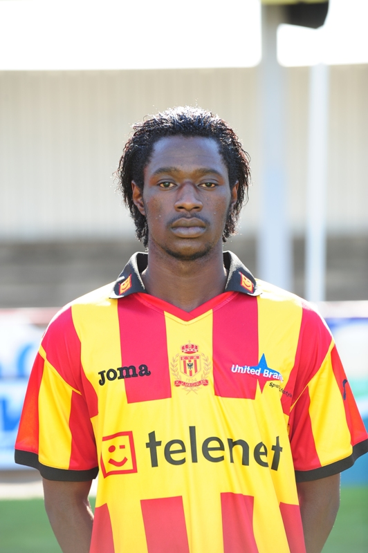 Abdul-Ganiyu Iddi